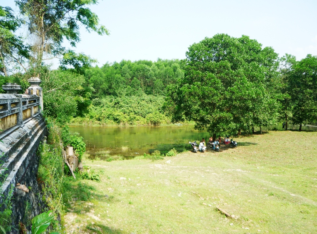 Thể loại:Nhà Nguyễn Thể Loại:Di tích cố đô Huế Thể loại:Lăng tẩm các Vua chúa Nguyễn Thể loại:Di tích ngoài Kinh Thành Huế